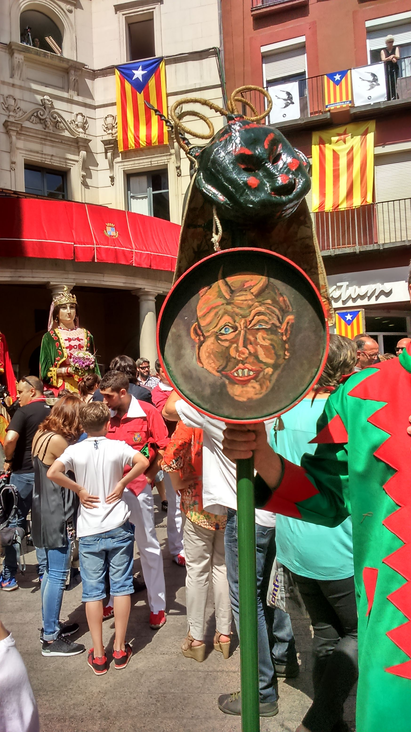 Maca de la patum de Berga, maca i careta.